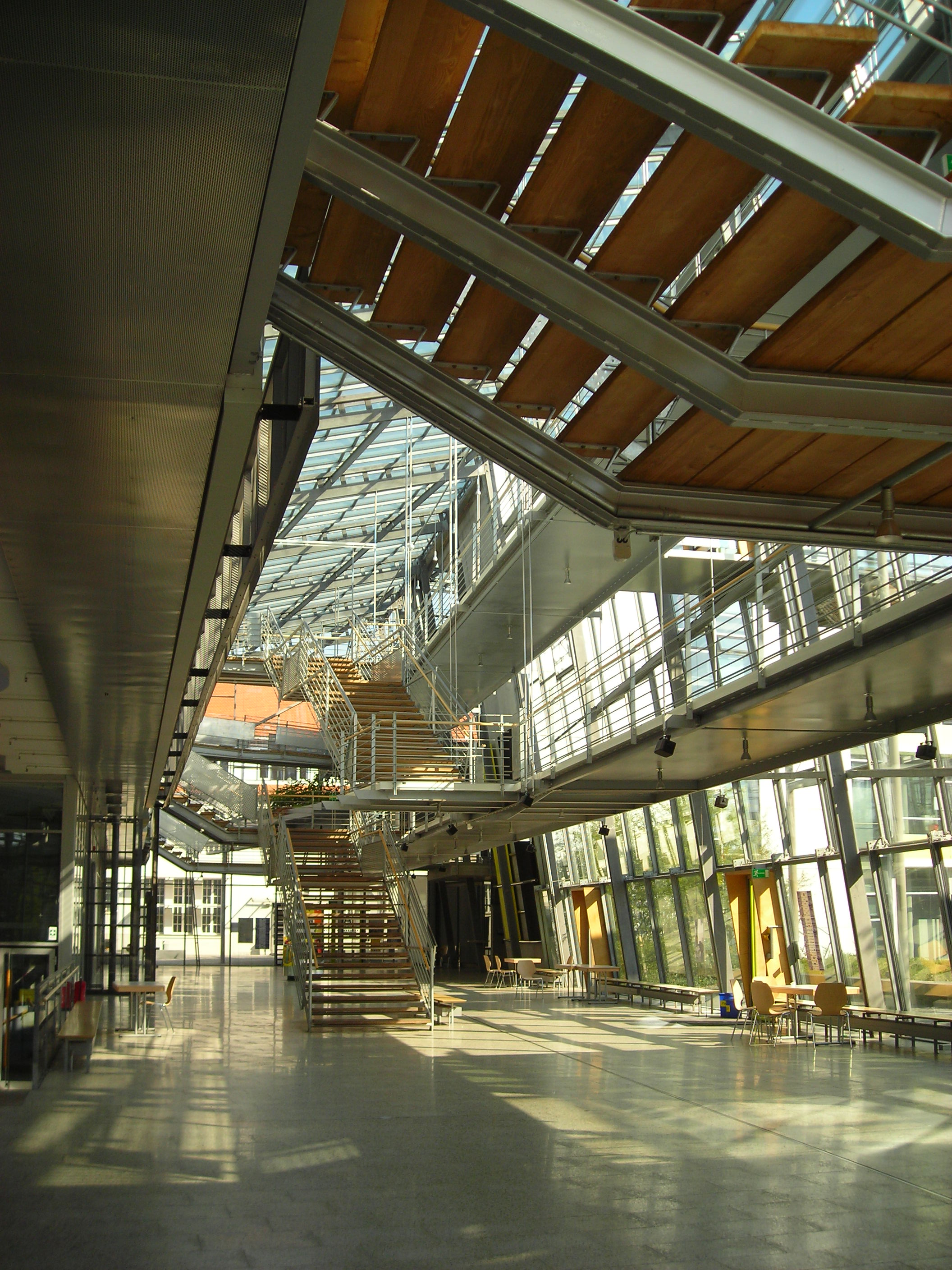 Fachhochschule Ingolstadt - Foyer